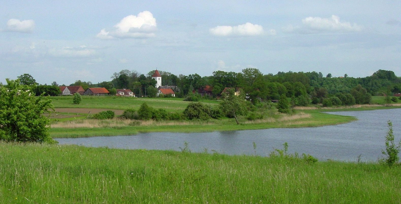 Panorama wsi